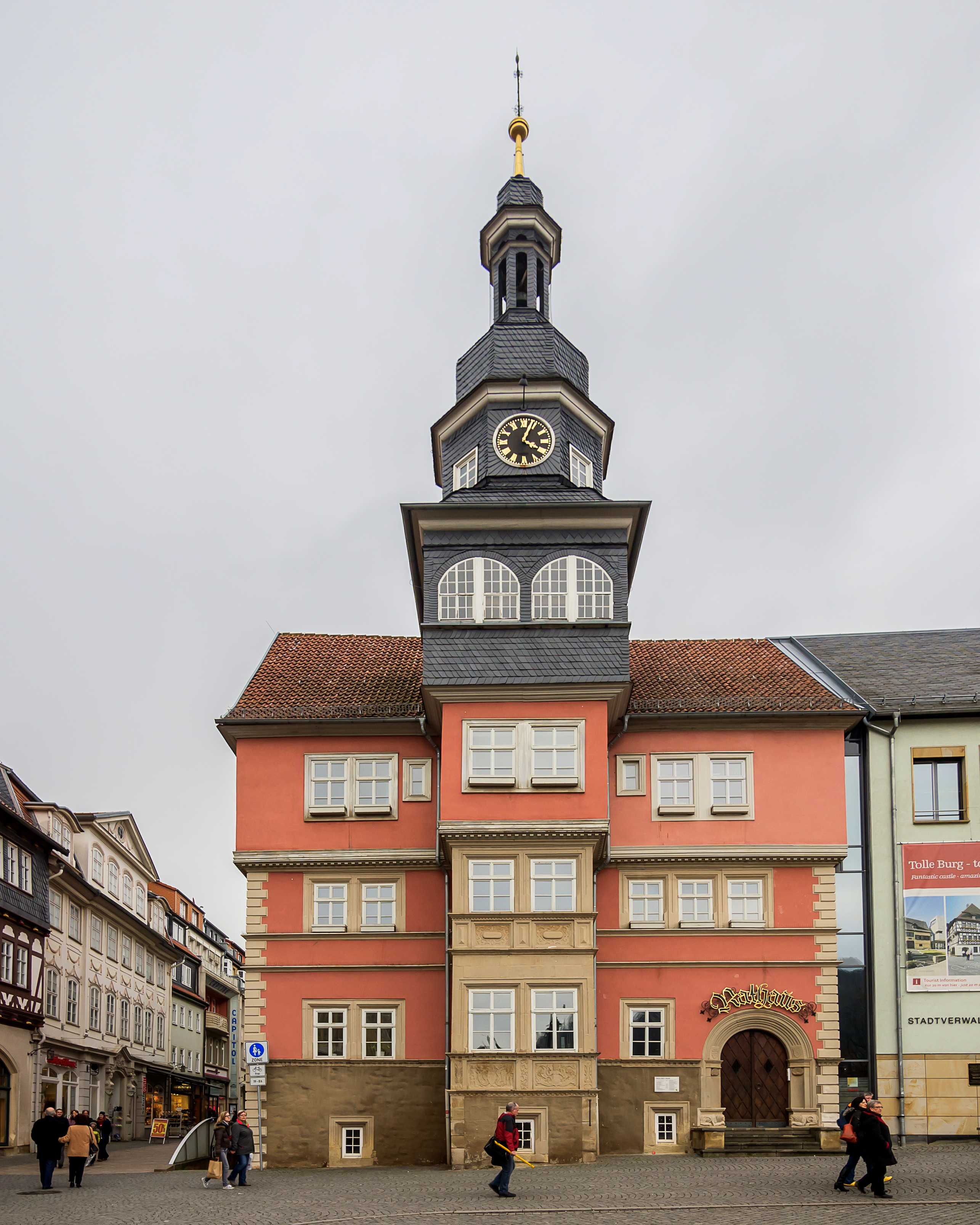 Eisenach Rathaus Markt 1